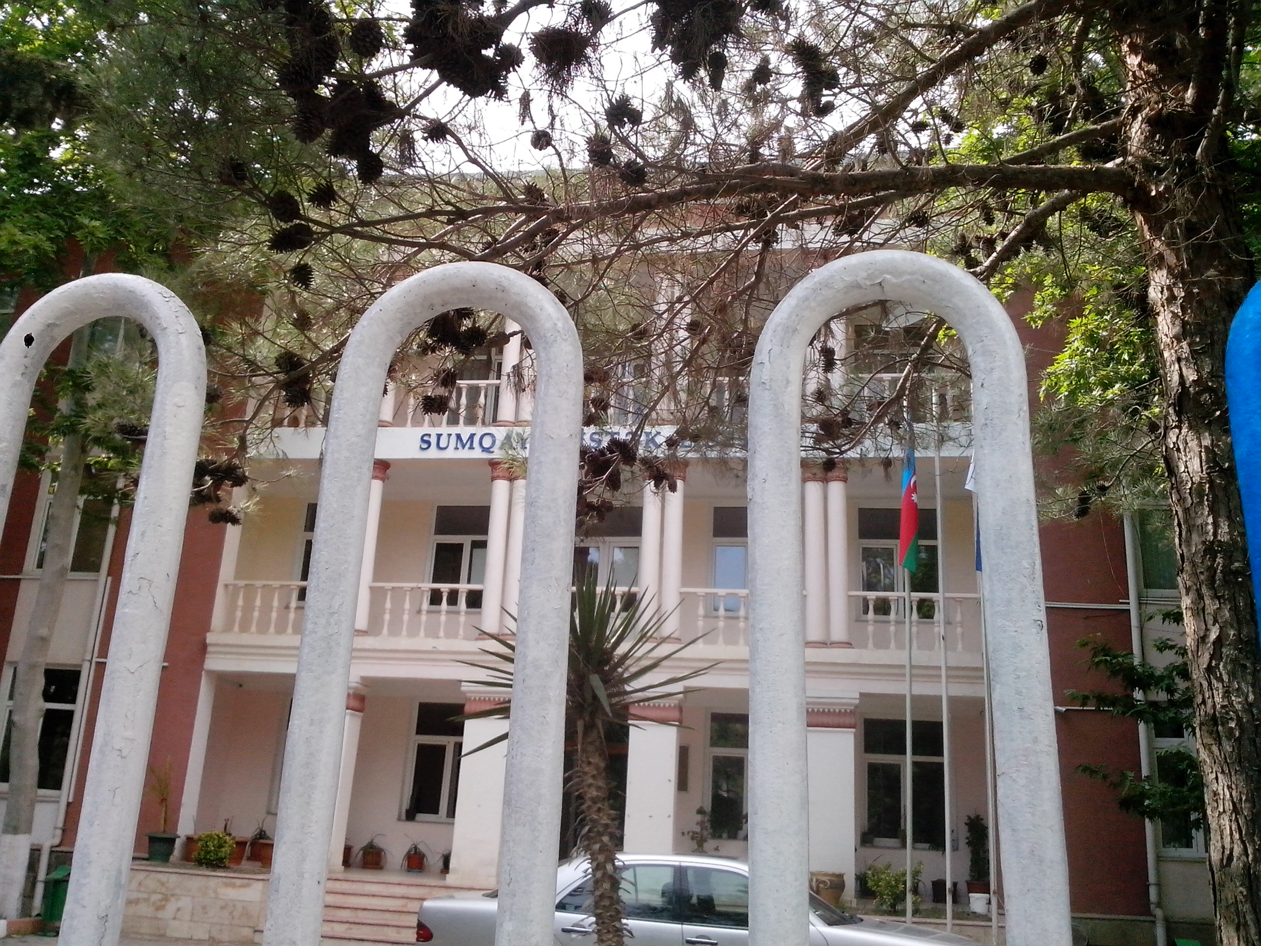 Sumqayıt İstək Liseyi